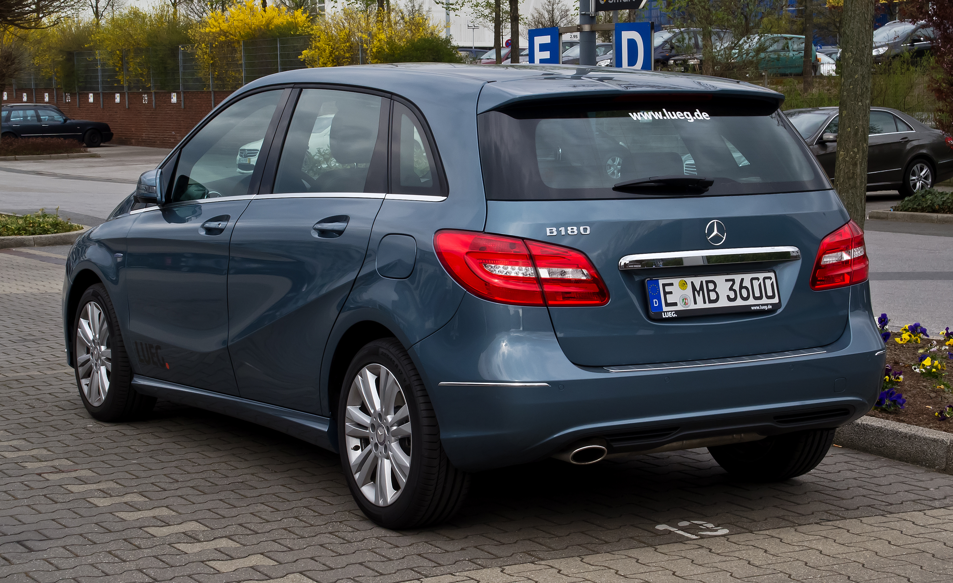 Mercedes-Benz B 180 BlueEFFICIENCY (W 246)